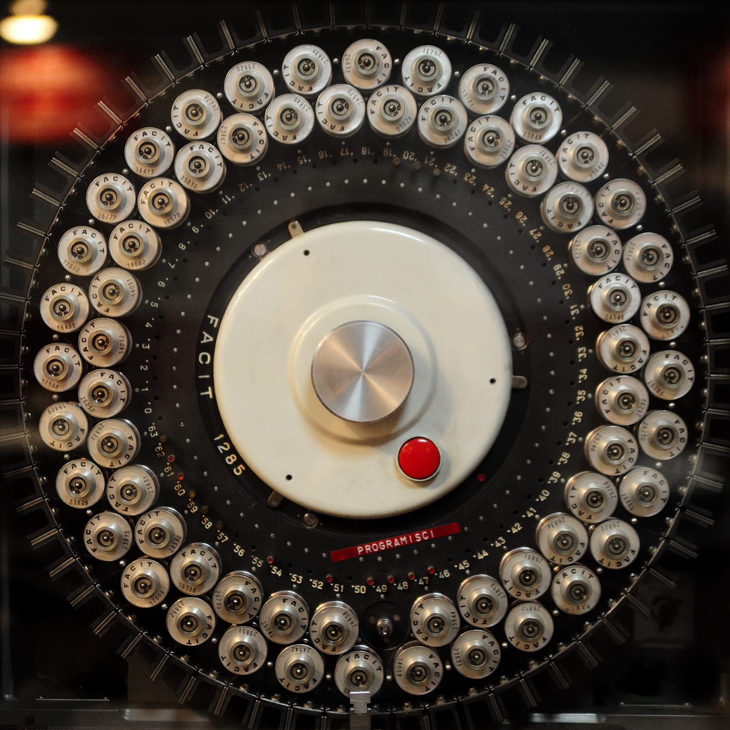 Warszawskie Spacery Fotograficzne Spacer 107 (Muzeum Techniki)